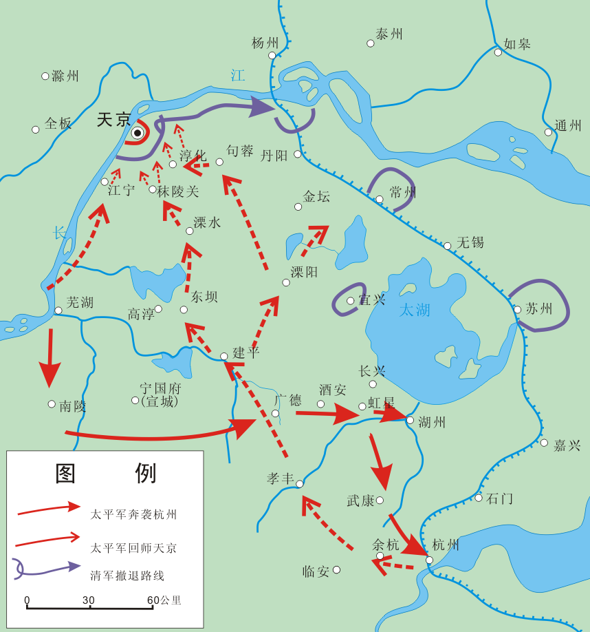 中文（中国大陆）: 太平军二破江南大营作战示意图